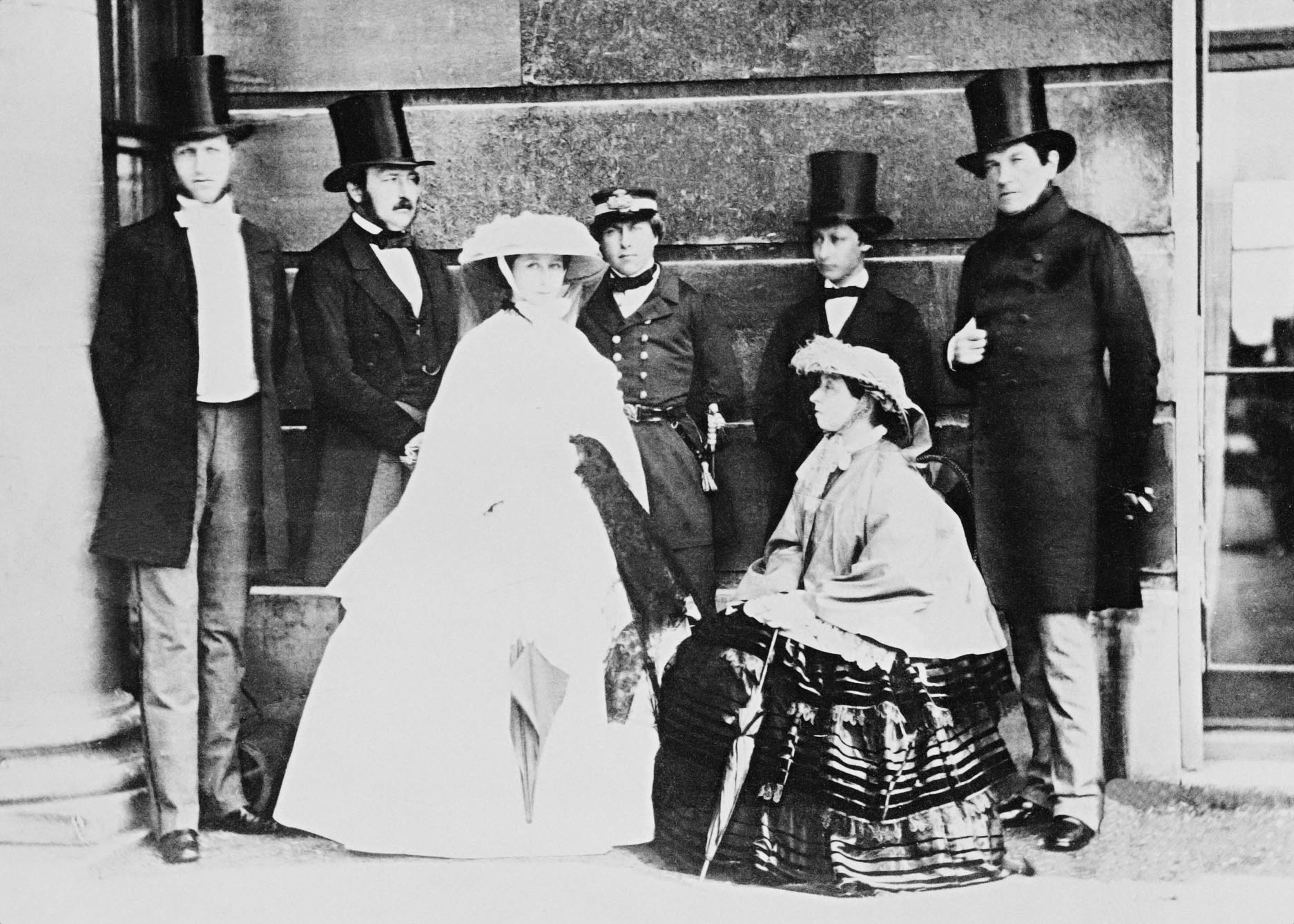 Restauration de la photographie